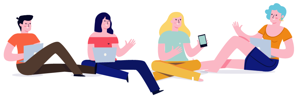 Jóvenes y tecnología